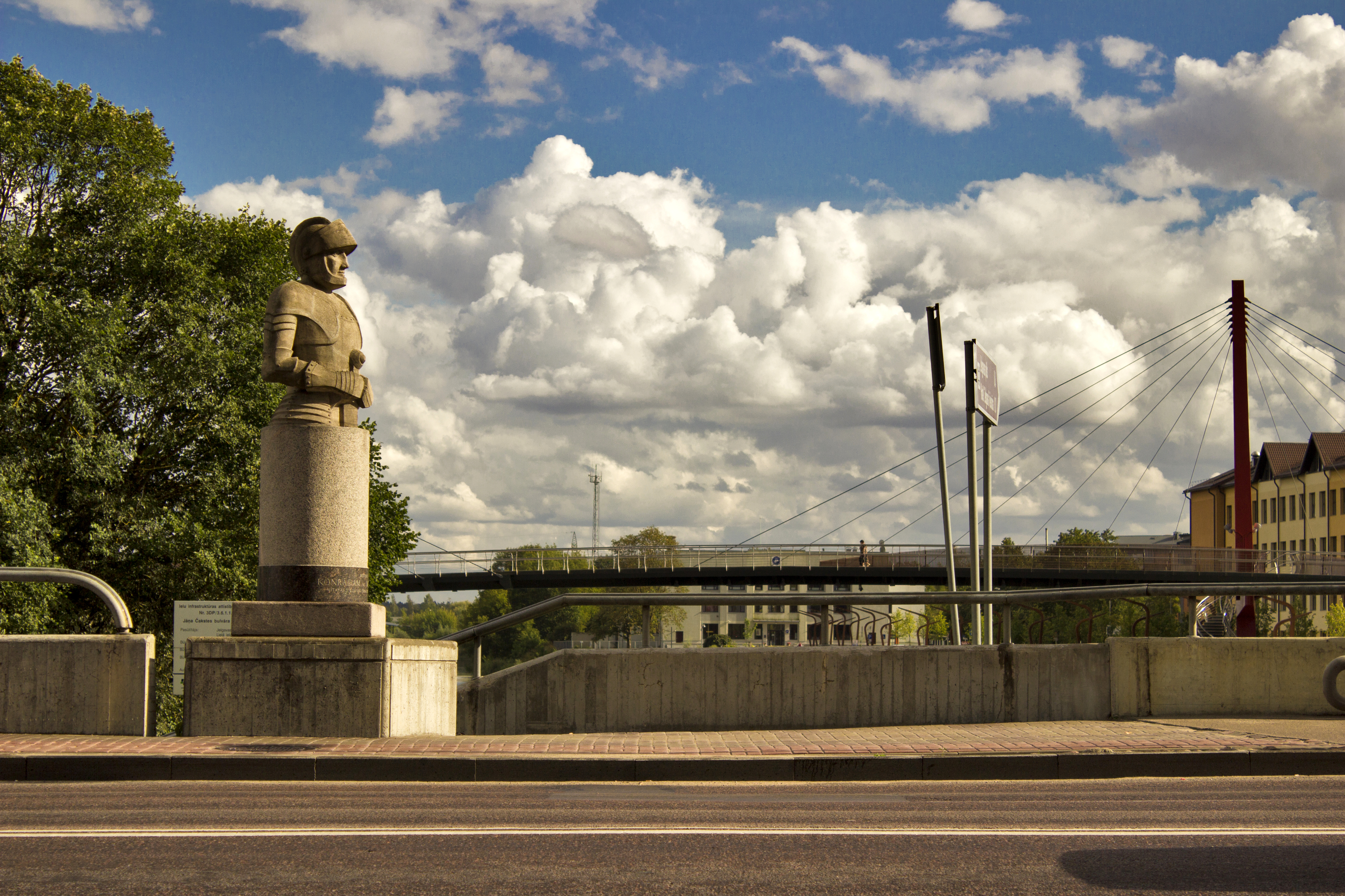 Jelgava